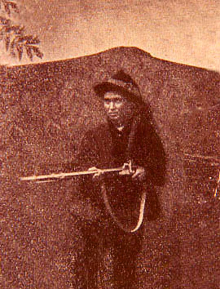 La brigantessa Maria Maddalena De Lellis detta Padovella.